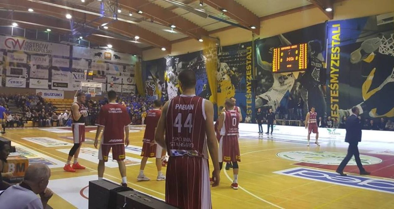 Ostrów - Spójnia (06.01.2019)